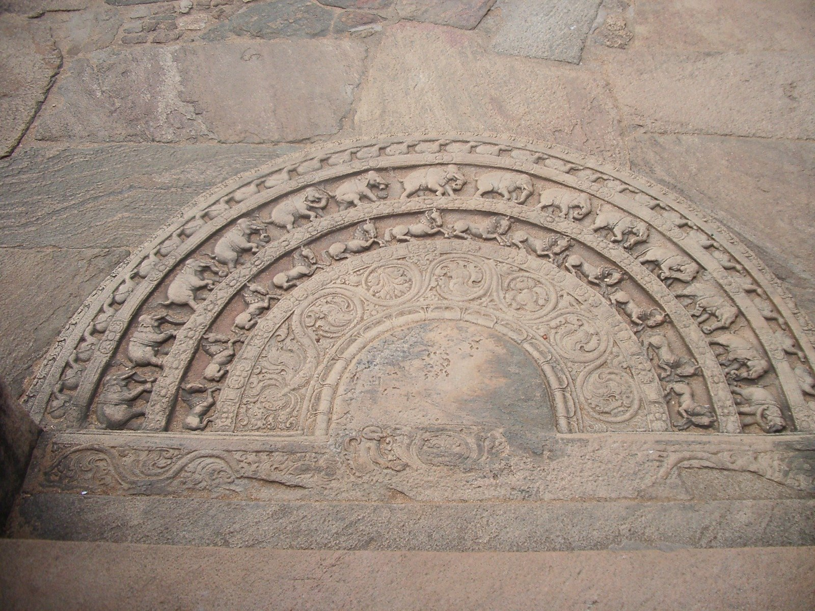 acces a un temple de Polonnaruwa; foto feta per J. Ollé el juliol del 2006